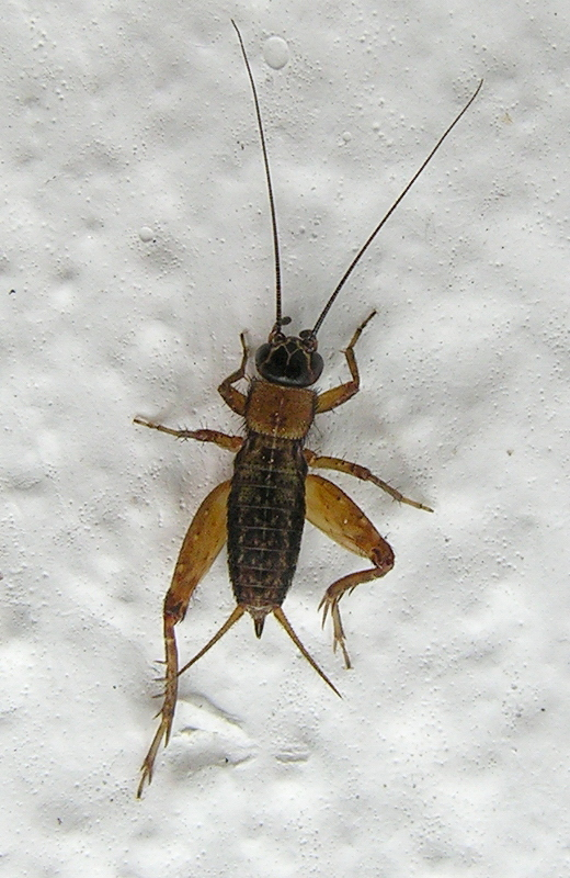 Nemobius sylvestris (Bosc d'Antic, 1792). Fotografado en Bastabales. Galicia